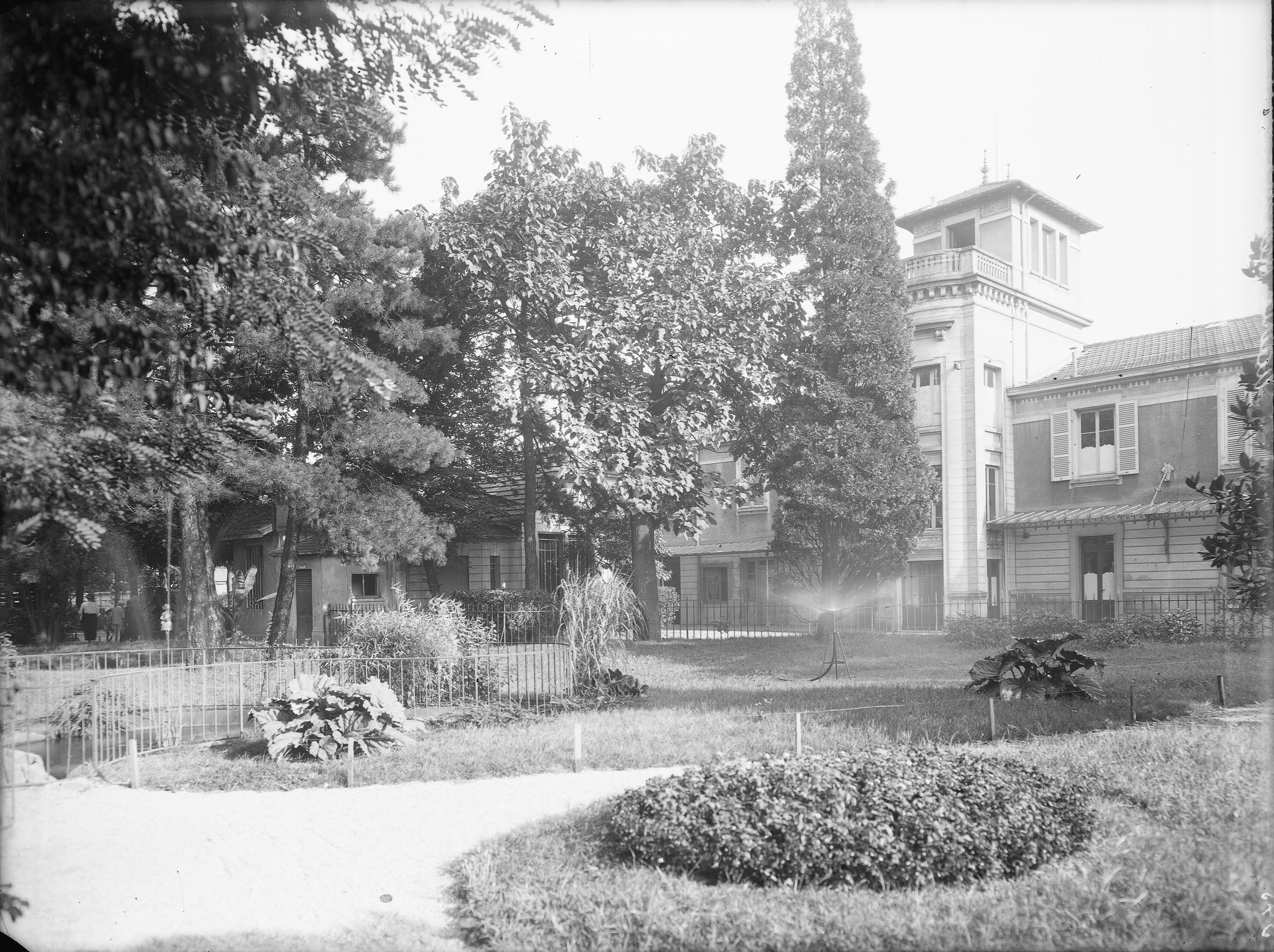 Pouponnière municipale de Villeurbanne et son parc.